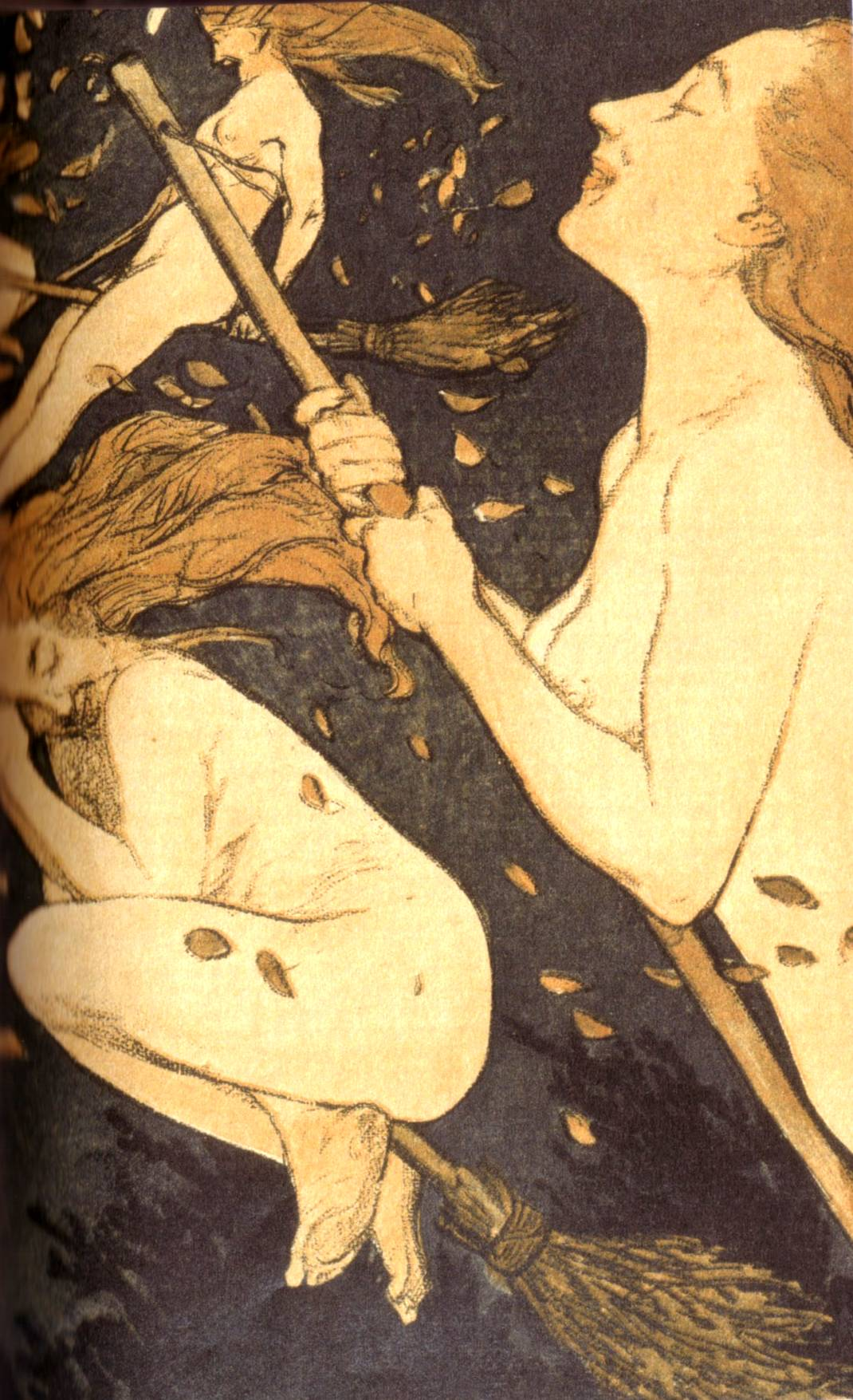 Gravure